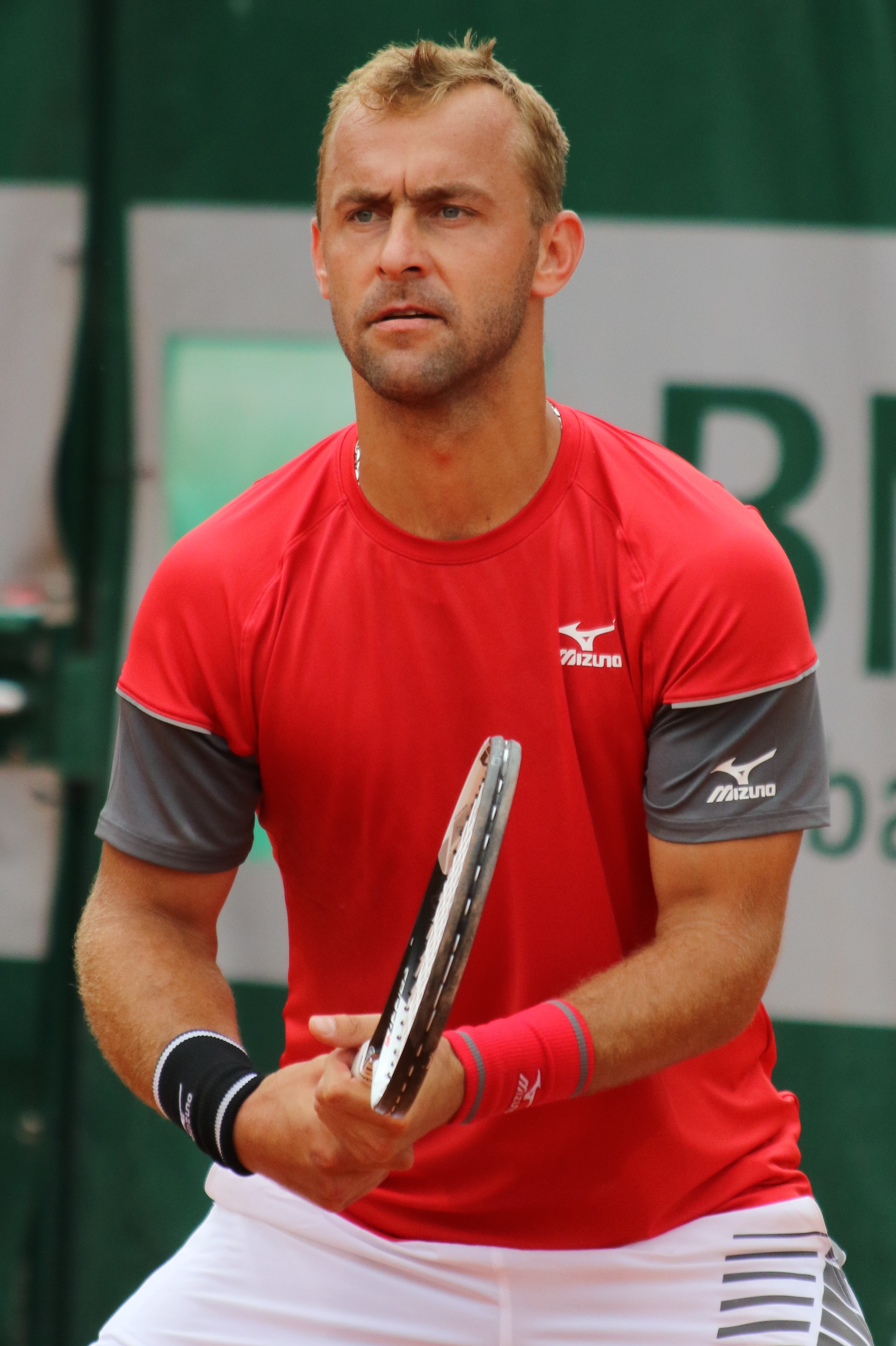 Jebavy RG18 (11)